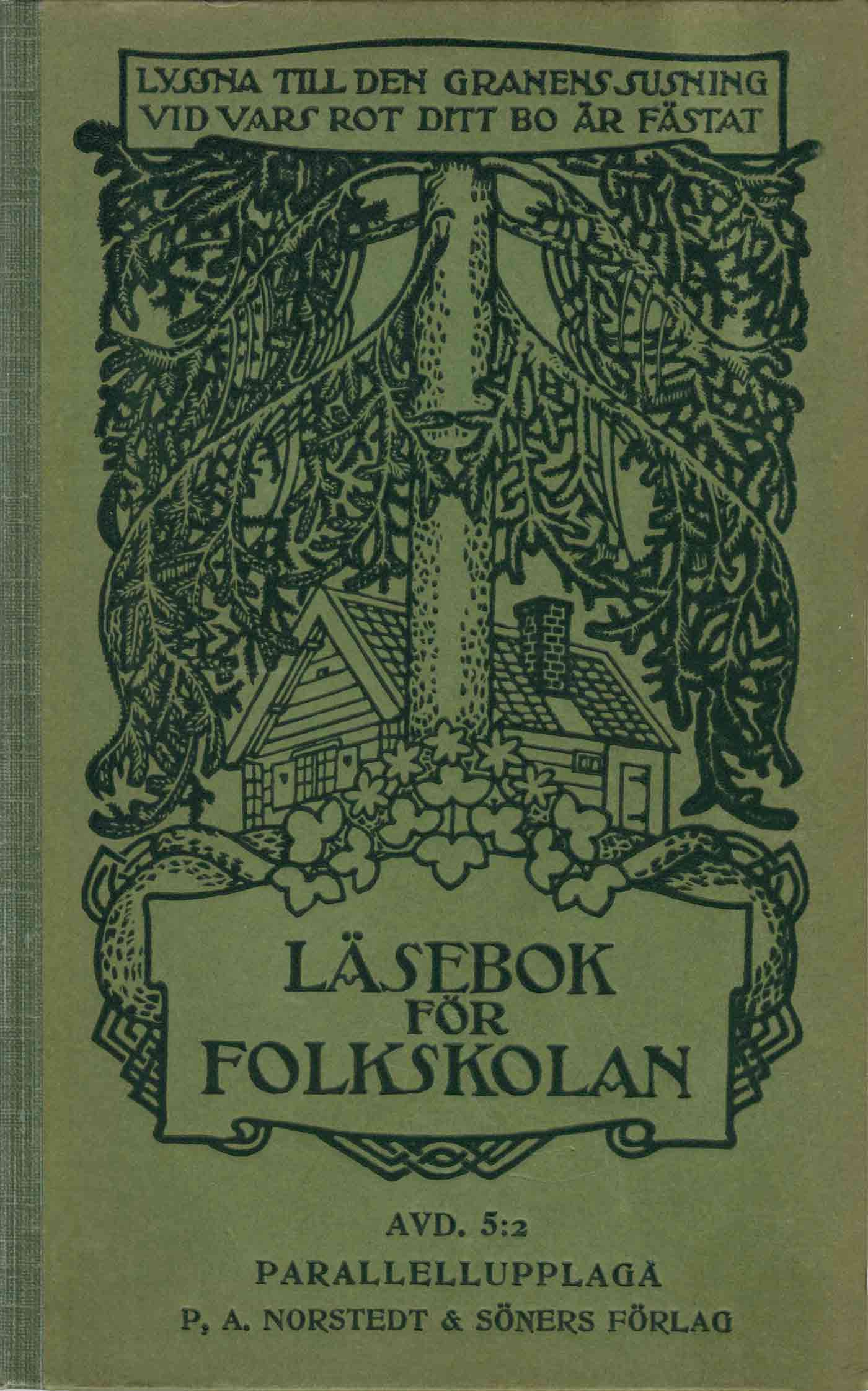 Cover of the textbook "Läsebok för folkskolan"